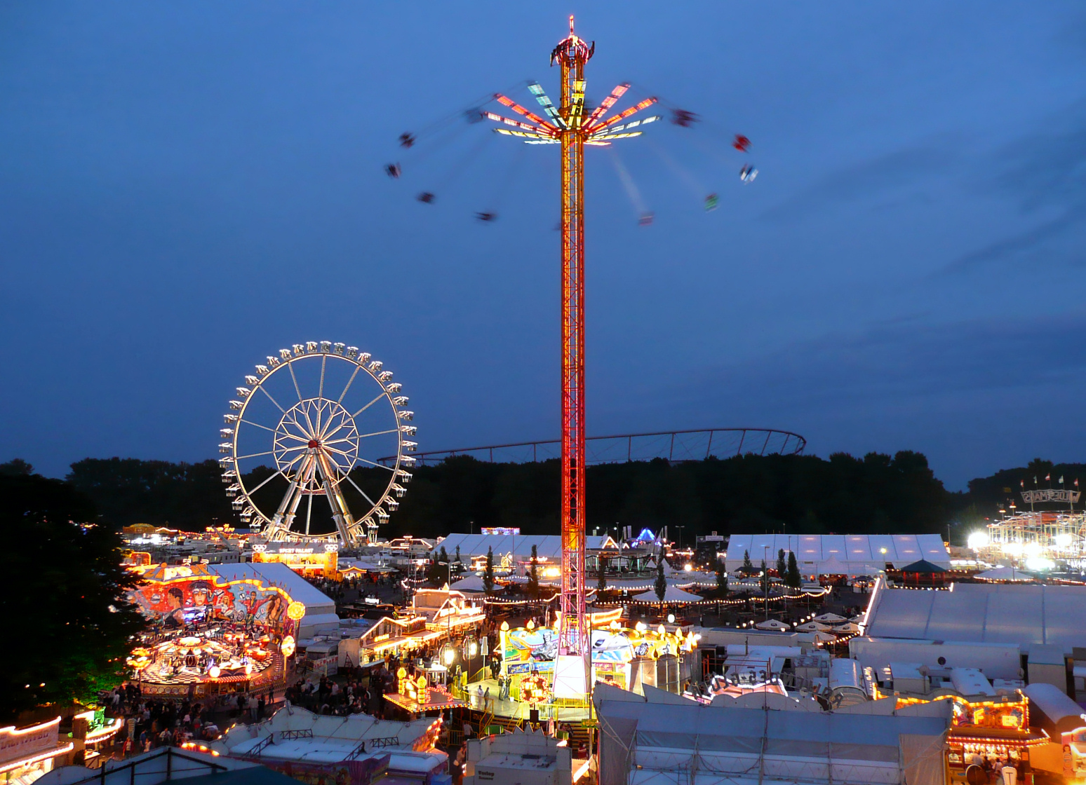 Kettenkarussell Schützenfest Hannover